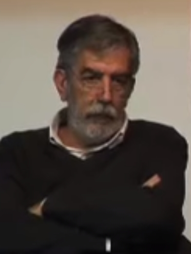 Sesión del Club de Debates Urbanos sobre desigualdad Intervienen: Félix Arias. Arquitecto Jesús Gago. Arquitecto Francisco López Groh. Urbanista Eduardo Mangada. Arquitecto Presenta y modera: Carlos Berzosa Catedrático de Economía Aplicada de UCM